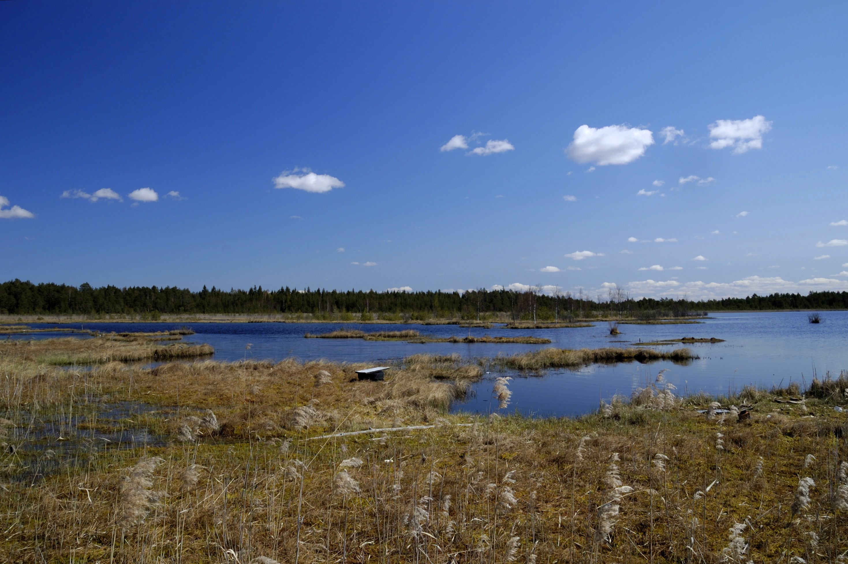 Laanemaa järv